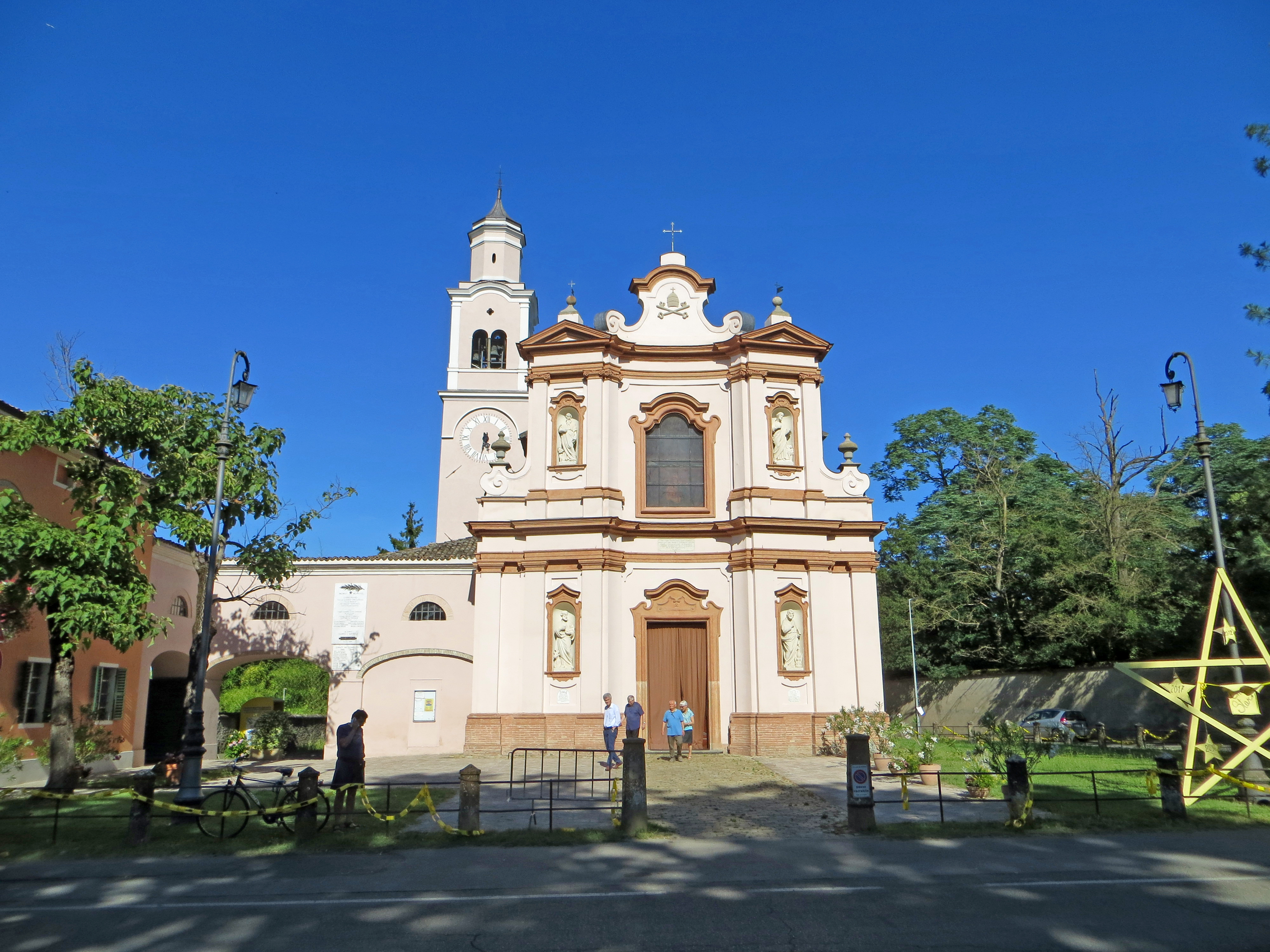 Chiesa di San Pietro Apostolo (Carignano, Parma) - facciata